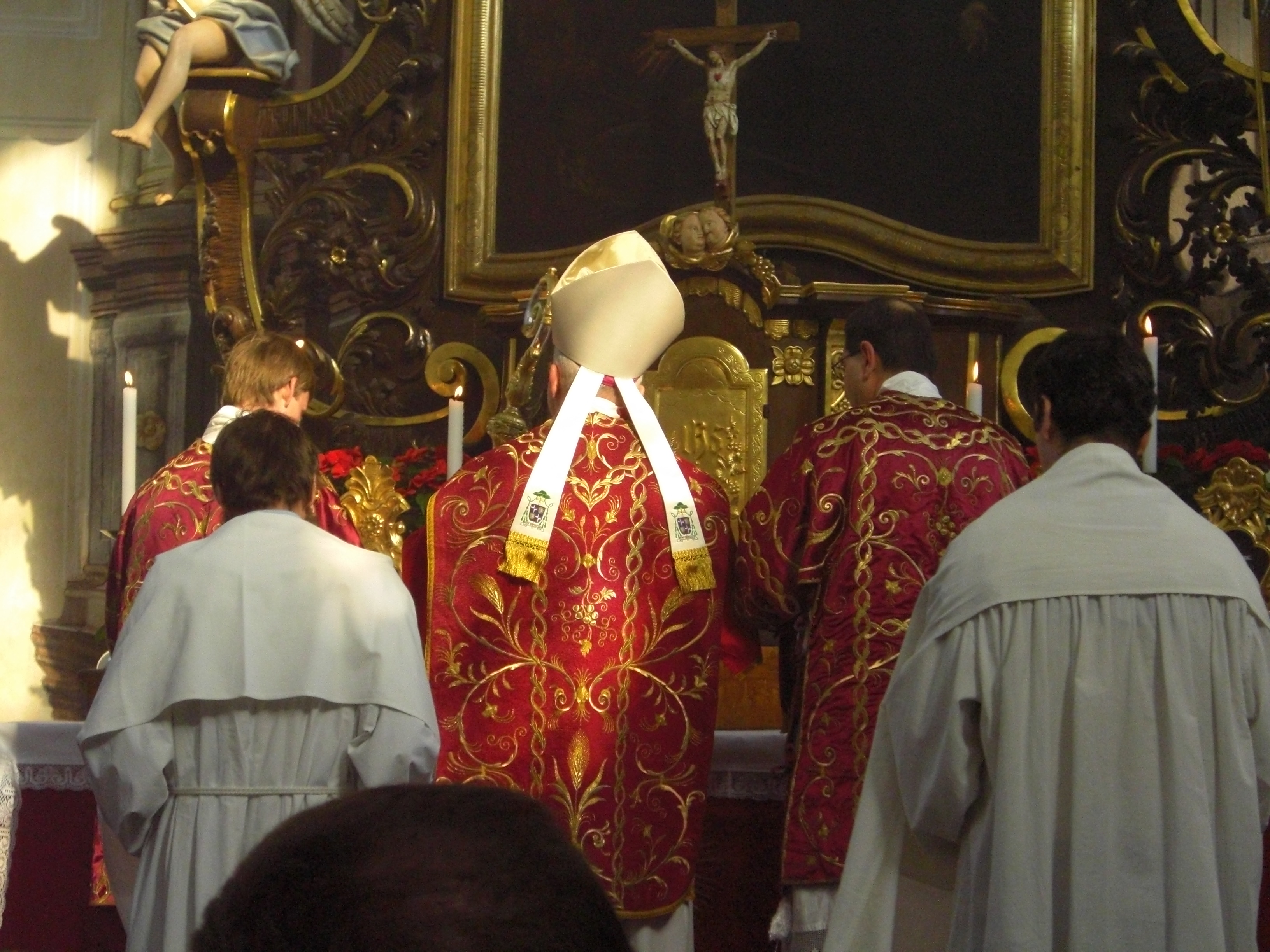 Pontifikální Mše podle misálu Jana XXIII. v Počapech u Terezína